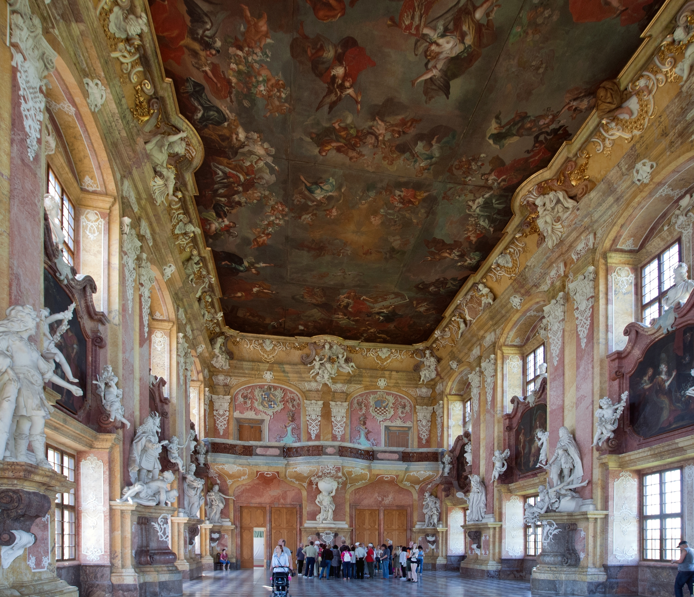 Opactwo cystersów w Lubiążu – Sala Książęca, widok na część zachodnią z trybuną muzyczną